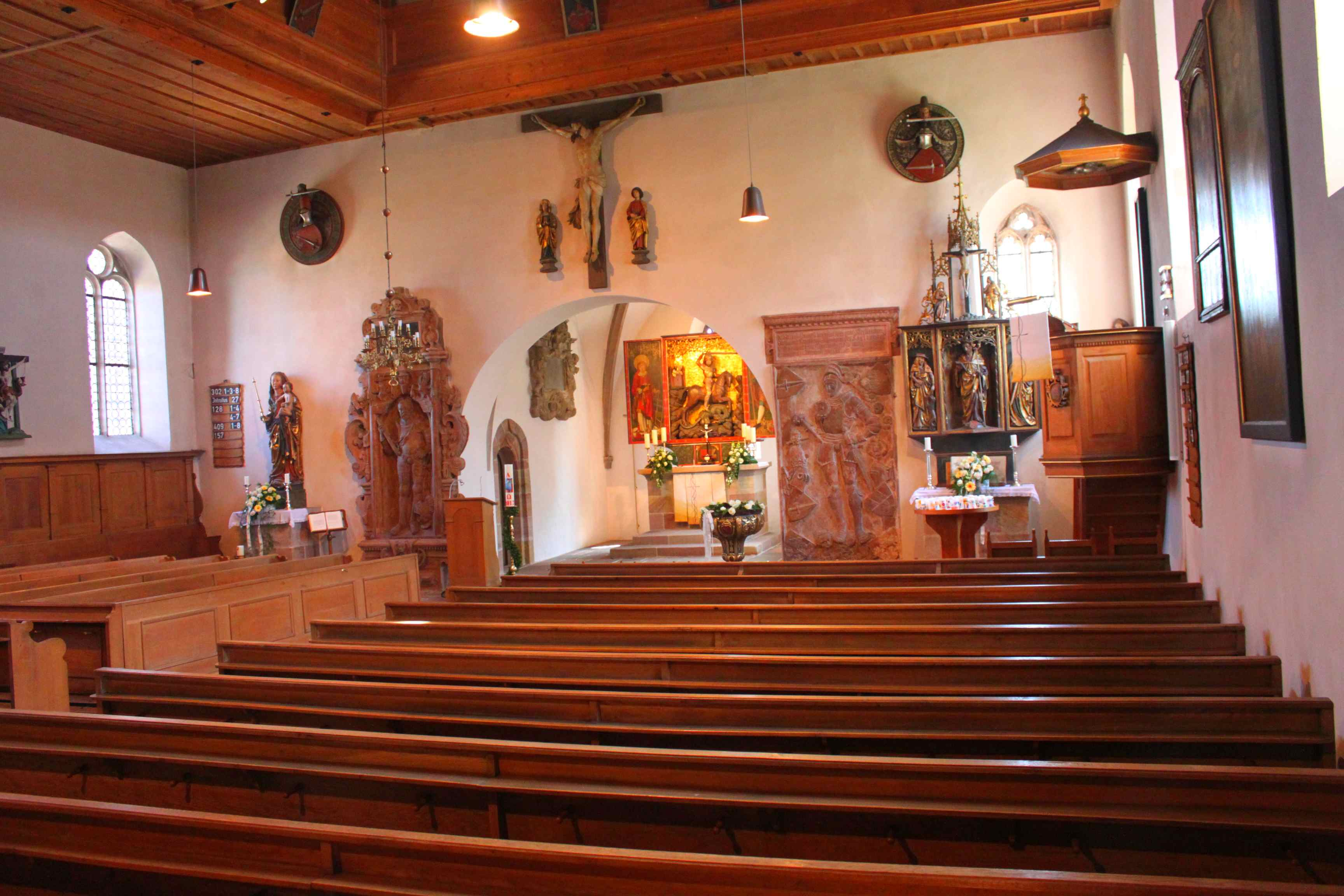 Die Kirche St. Georg mit Wehrkirchhof ist vom Ostersonntag bis zum Reformationsfest täglich von 8.00 bis 18.00 Uhr für Besucher geöffnet